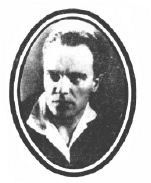 Майстренко Яків Васильович